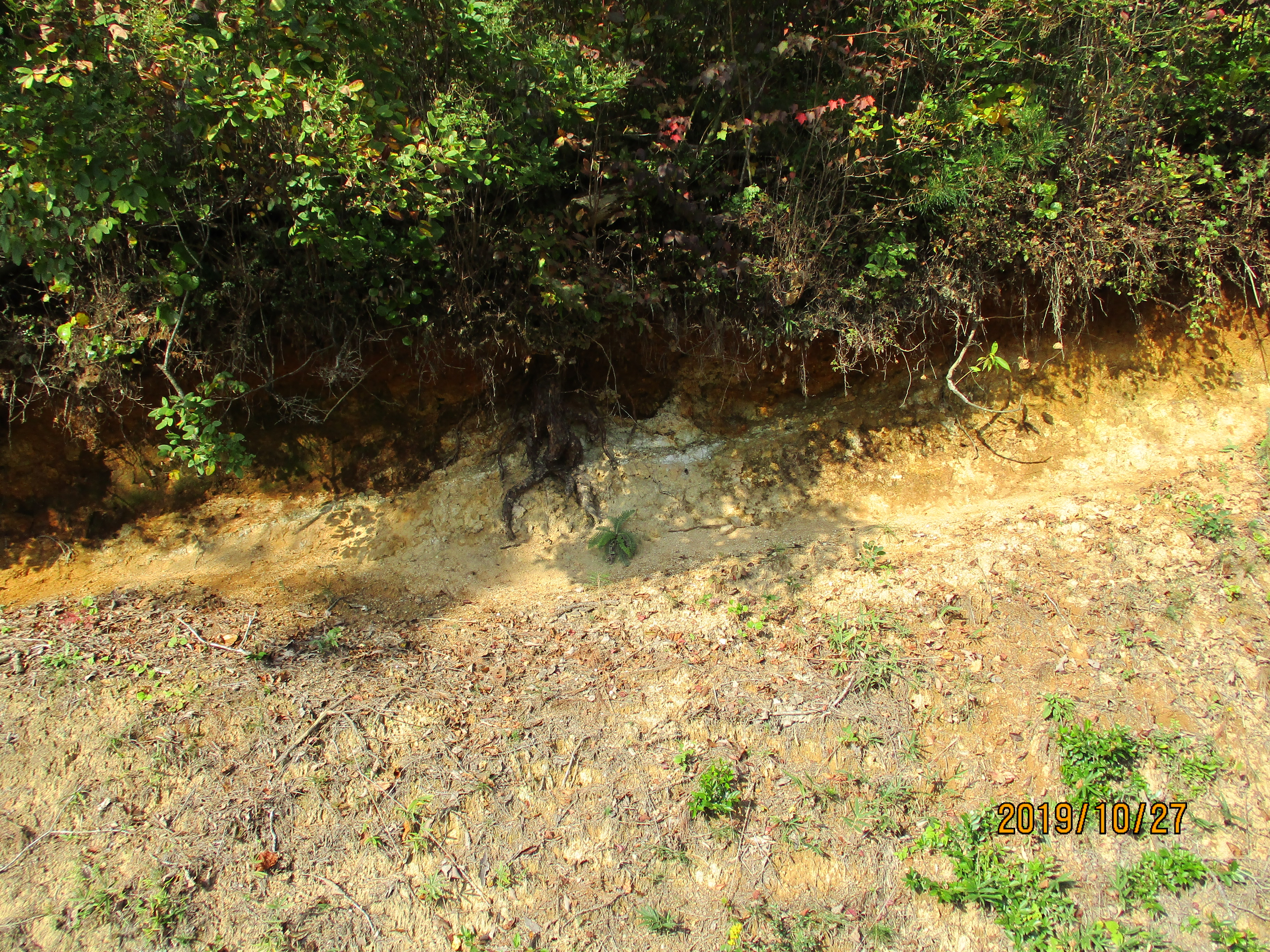 写真中央部の白い粘土層を境に，上方の岩盤が左から右へ押し上げられている。